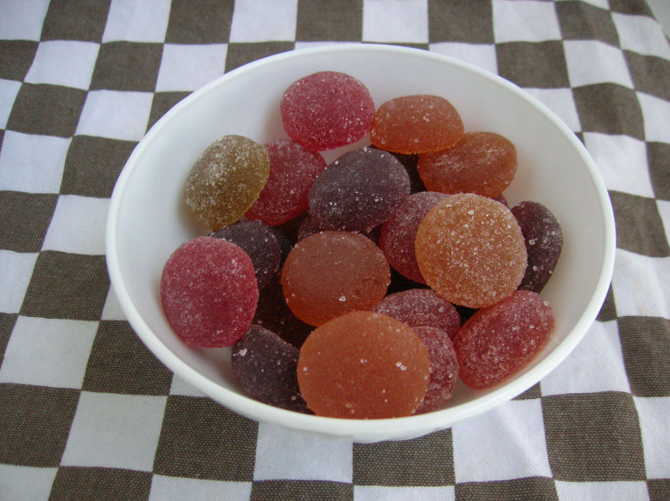 Pâtes de fruits d'Auvergne, fabriques à Saulcet, France.